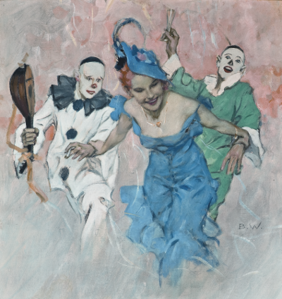 Columbine mit zwei Pierrotstitle QS:P1476,de:"Columbine mit zwei Pierrots" label QS:Lde,"Columbine mit zwei Pierrots"